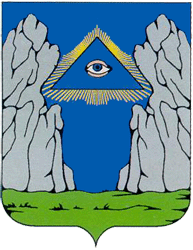 Herb miasteczka Podkamień